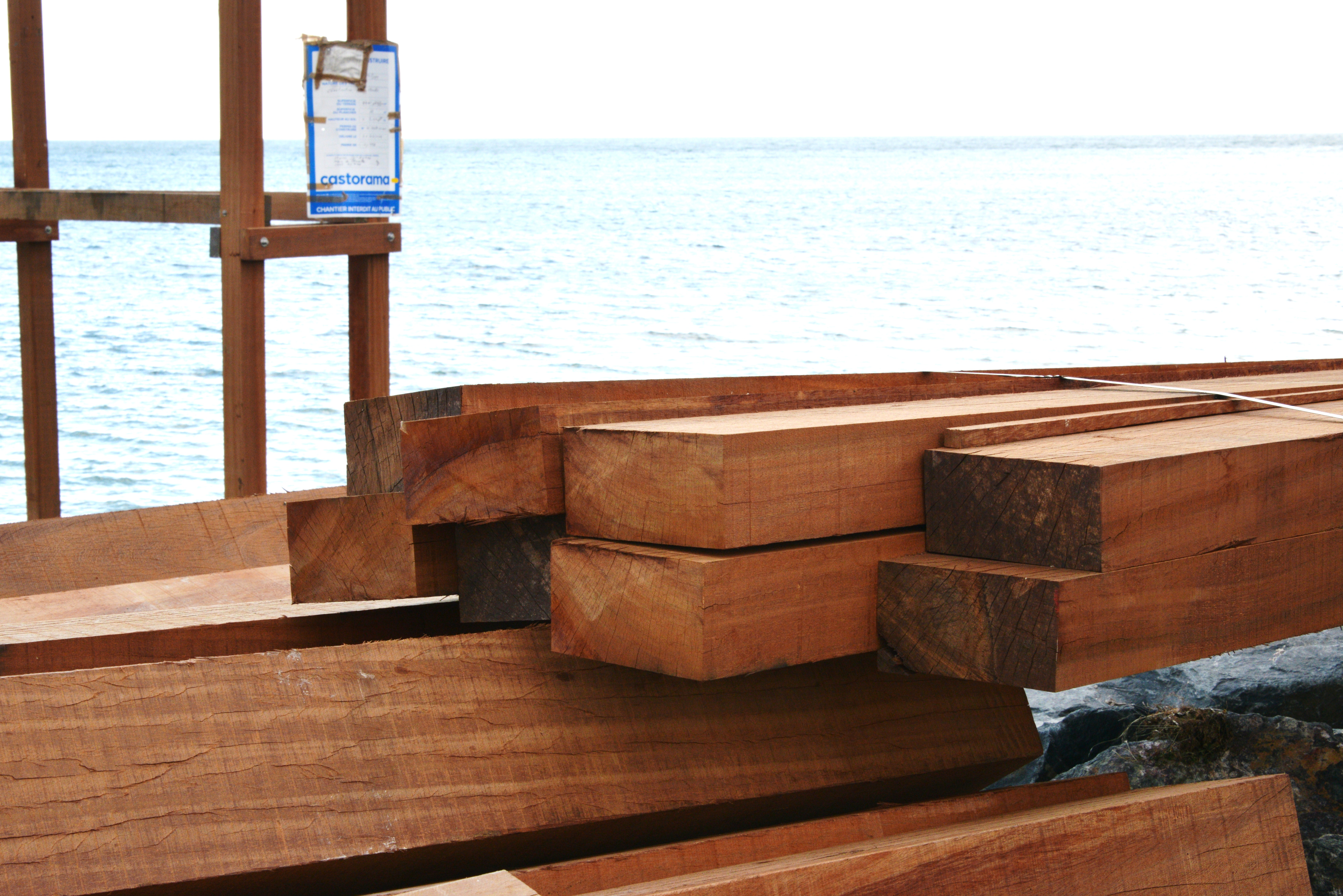 Début de la construction d’un carrelet sur ponton. Les madriers en bois utilisés. Chemin de la Gigas, Anse de Godechaud. Aytré, Charente-Maritime, France.